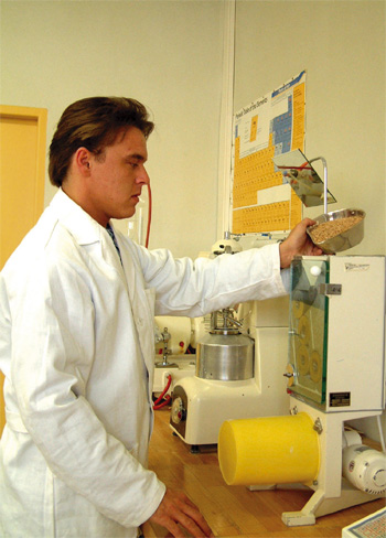 Beschreibung: Getreide- und Mehl-Labor Fotograf: Benutzer:burgkirsch 2002 Einverständniserklärung der abgebildeten Person zur Veröffentlichung liegt vor. Quellenangabe und Beleg an burgkirsch web.de erbeten.